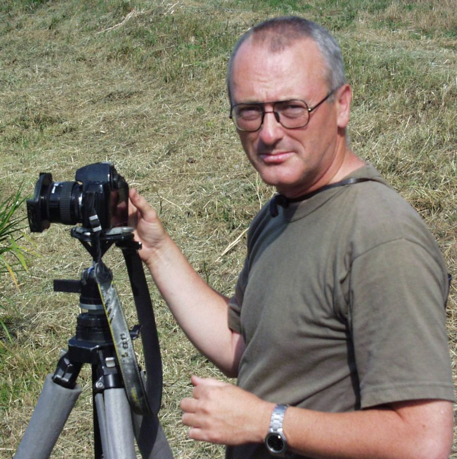 Nagy Csaba természetfotós